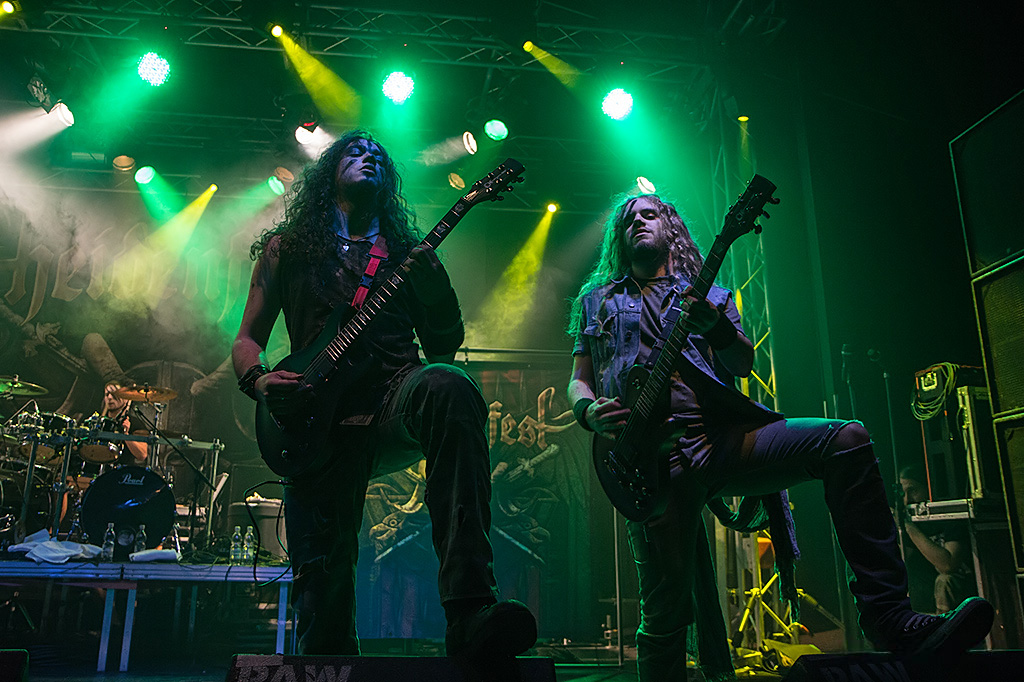 Krampus - Heidenfest - 2.11.2012 Geiselwind